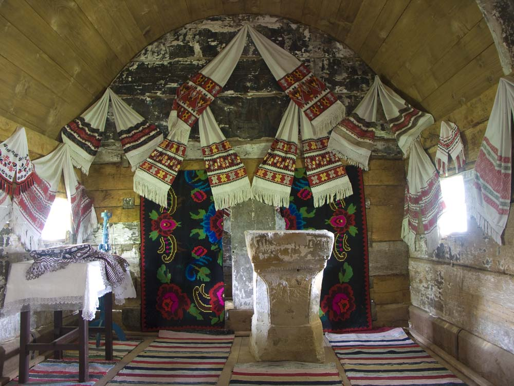 Prodăneşti, Sălaj. Biserica de lemn: interiorul navei.